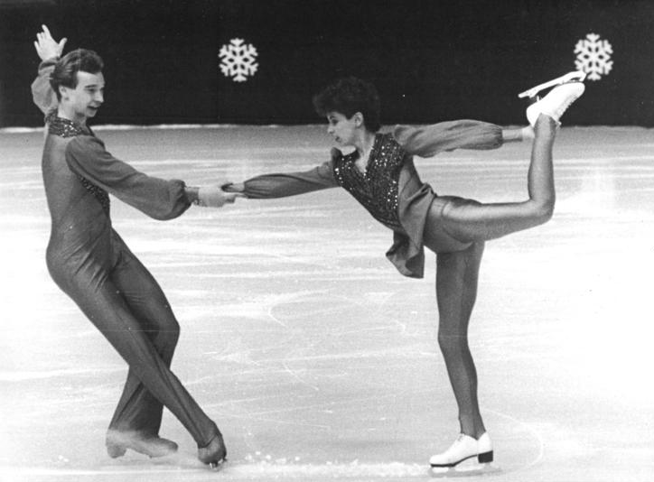 Katrin Kanitz, Tobias Schröter ADN-ZB Thieme 28.1.1986-ad-Dänemark: Eiskunstlauf-Europameisterschaften in Kopenhagen.- Nach dem am 27.1. ausgetragenen Kurzprogramm der Paarläufer liegen die DDR-Meister Katrin Kanitz und Tobias Schröter (SC Dynamo Berlin) auf dem dritten Platz. (Foto von einem früheren Wettkampf!)